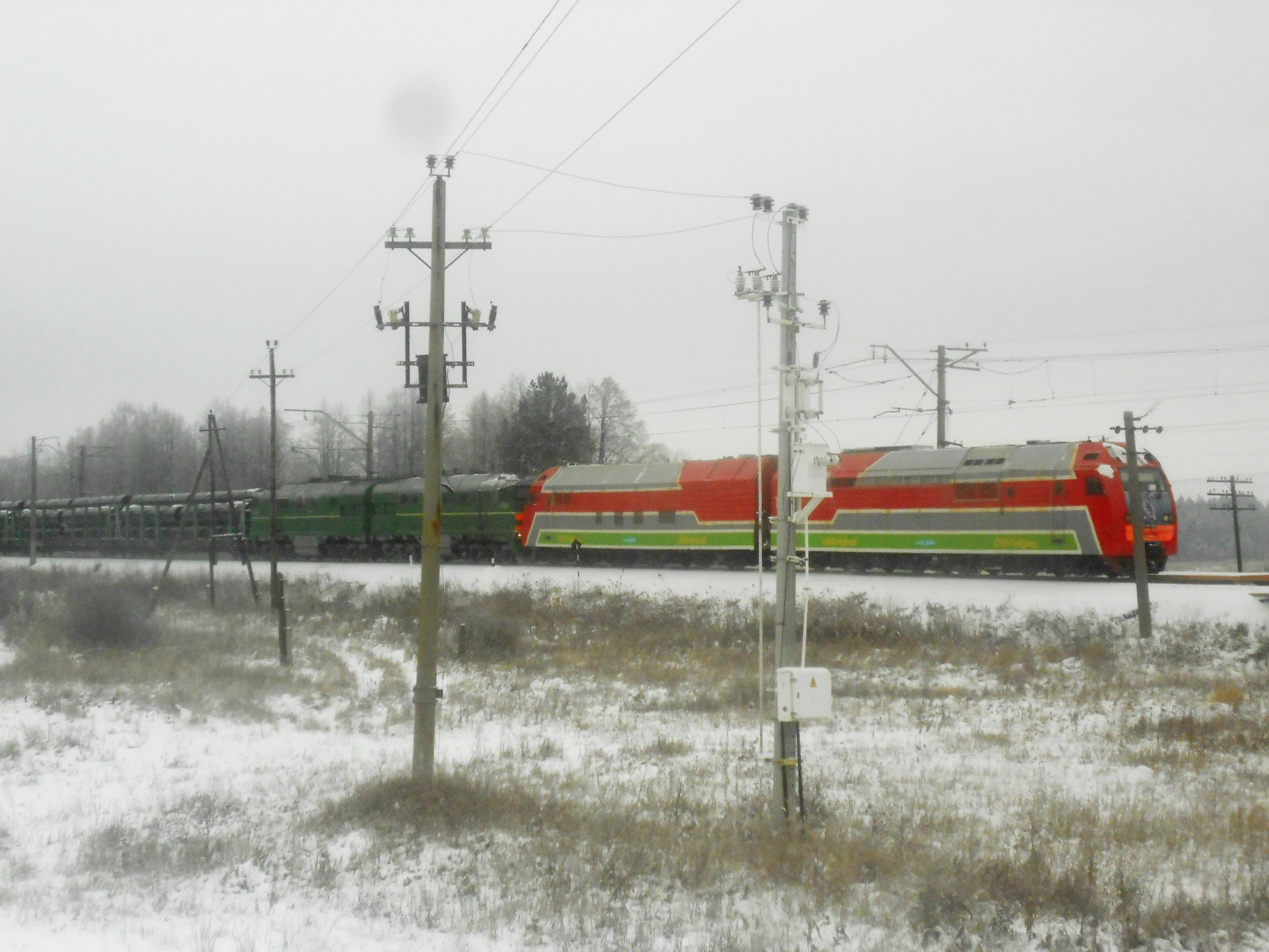 Газотурбовоз ГТ1h-001 и тепловоз 2ТЭ116 с грузовым поездом недалеко от Алапаевска